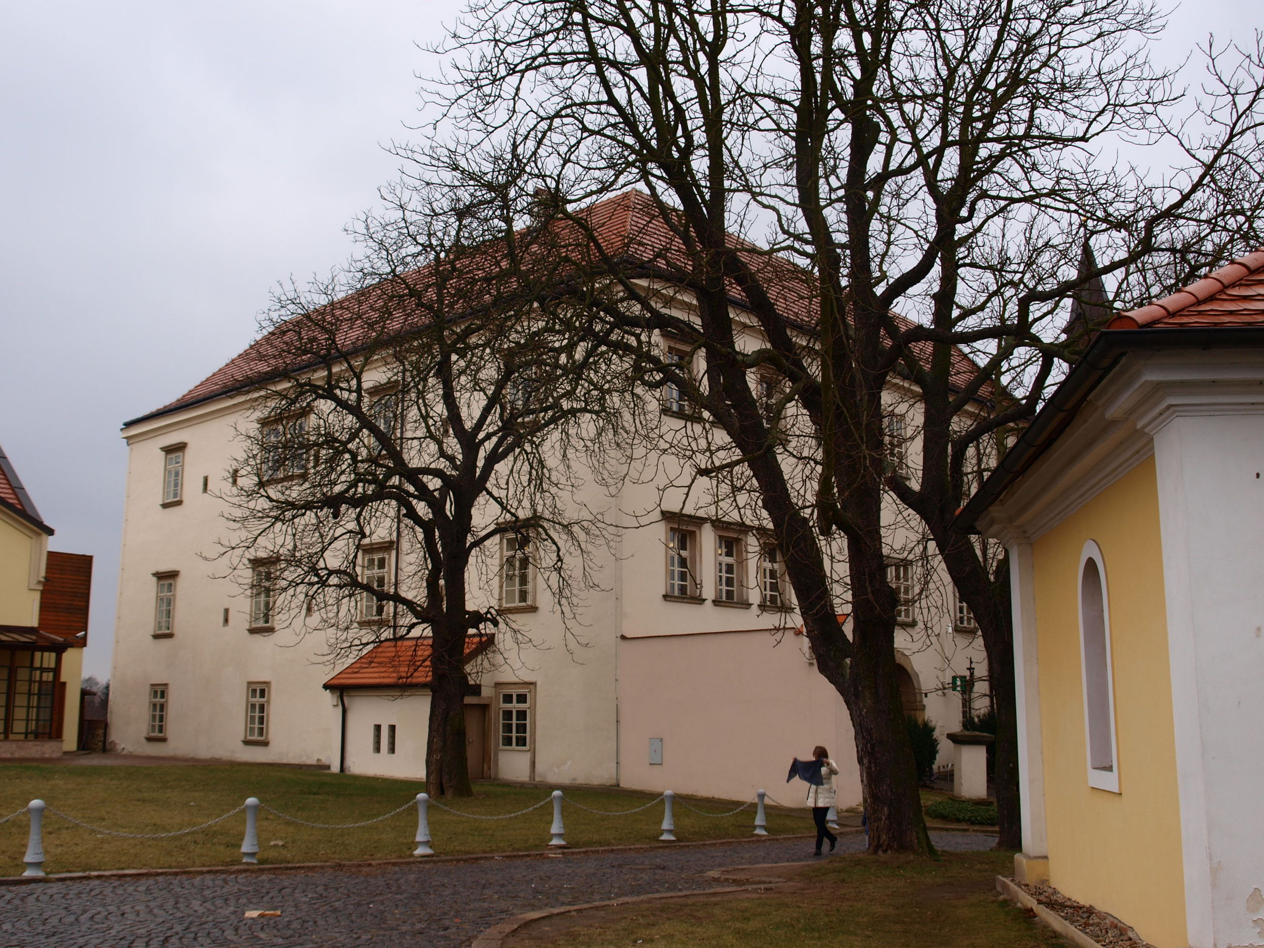 Tvrz Chvaly